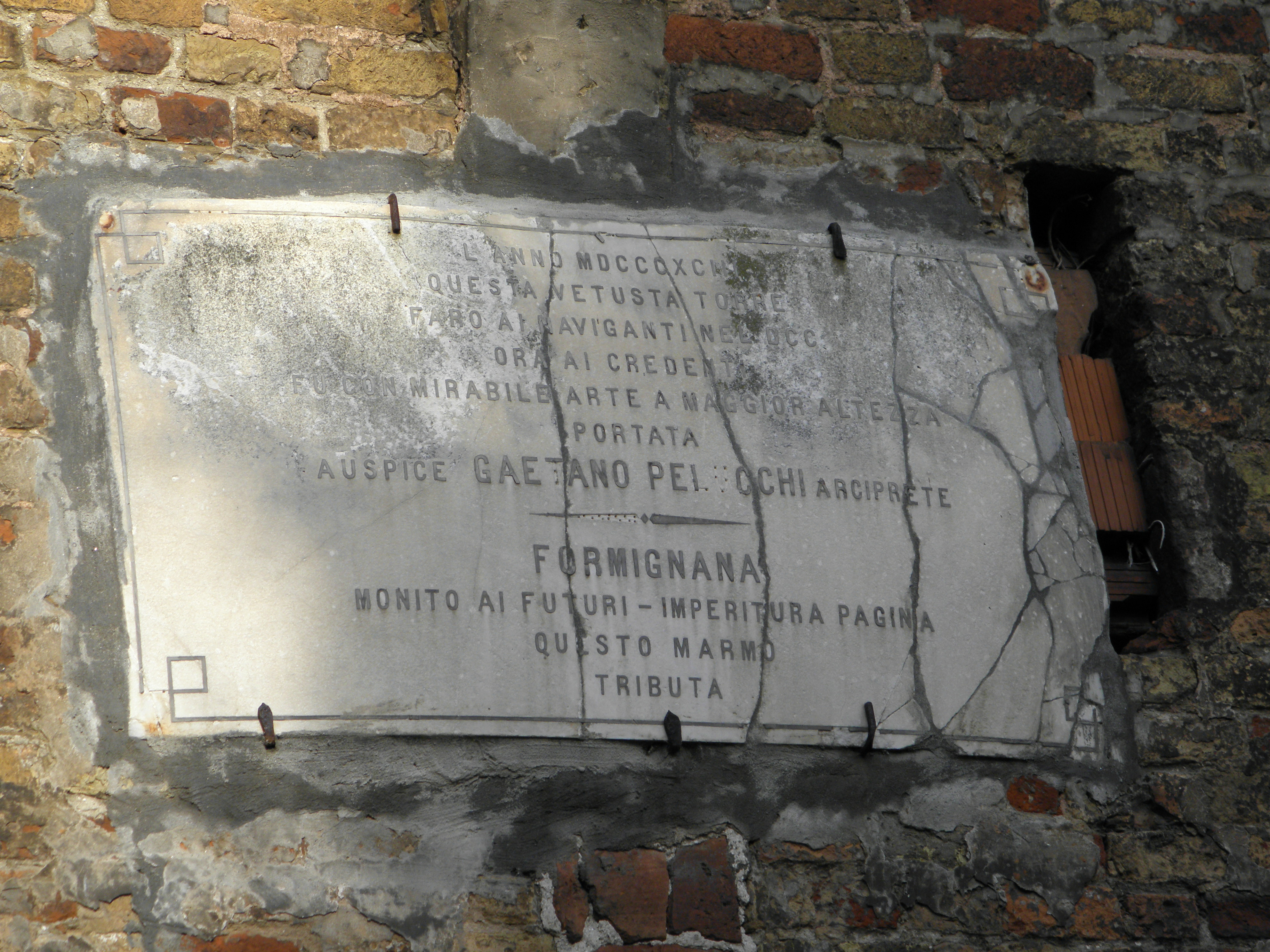 Formignana, la lapide commemorativa murata sul lato sud del campanile della chiesa di Santo Stefano.